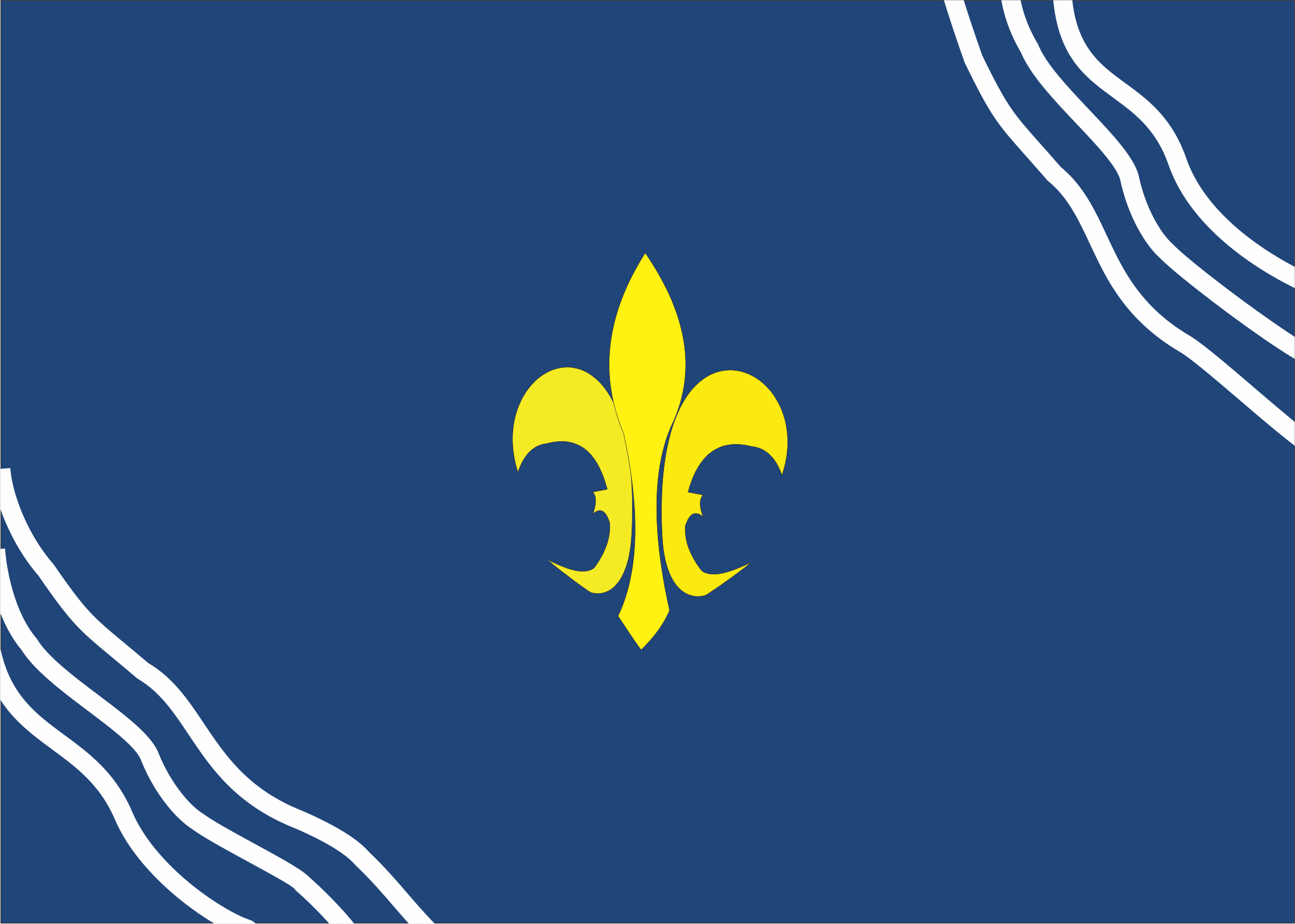 Modelo da Bandeira do Município de Entre Rios - Bahia